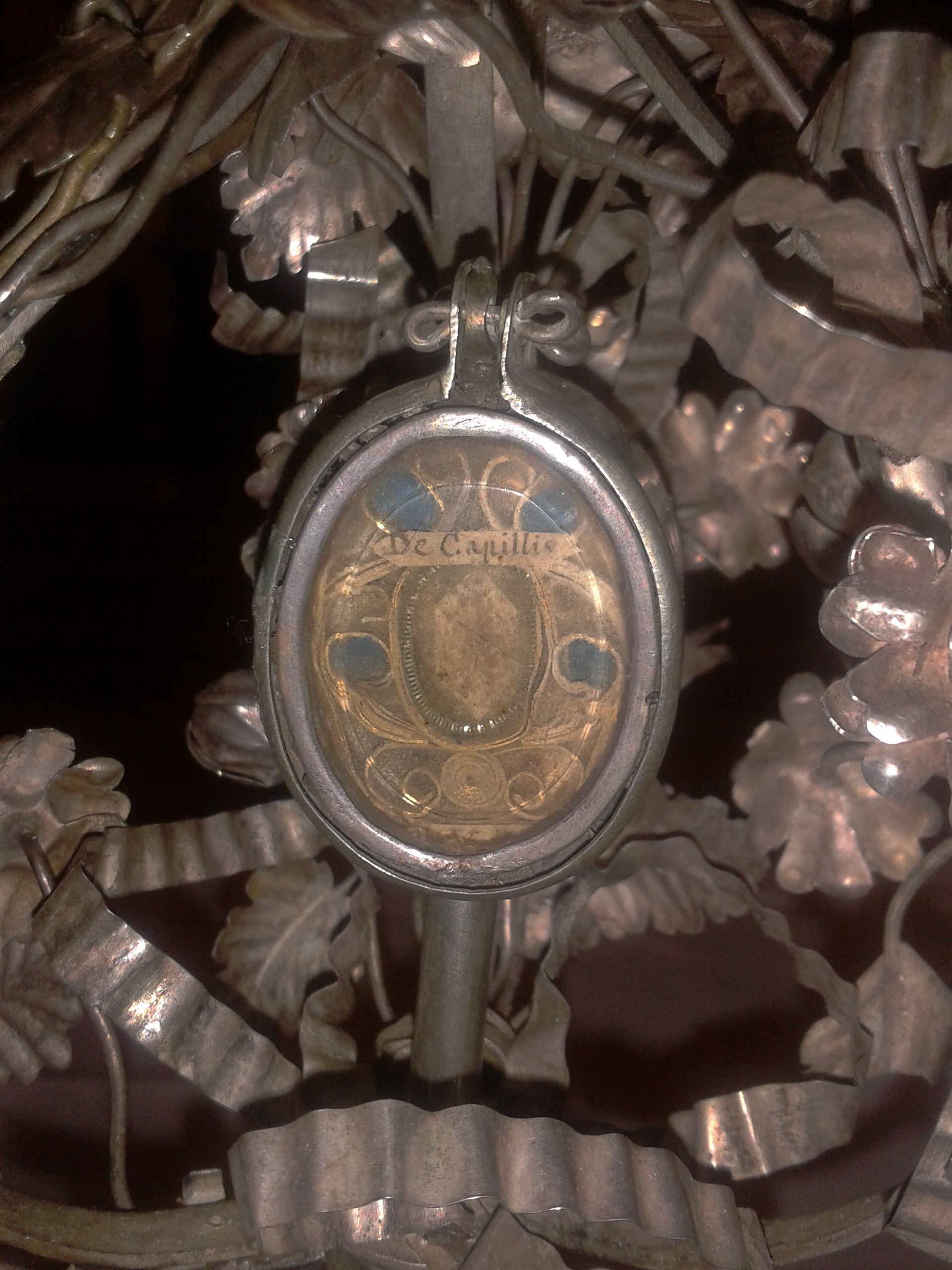 Reliquia del Sacro Capello di Palmi